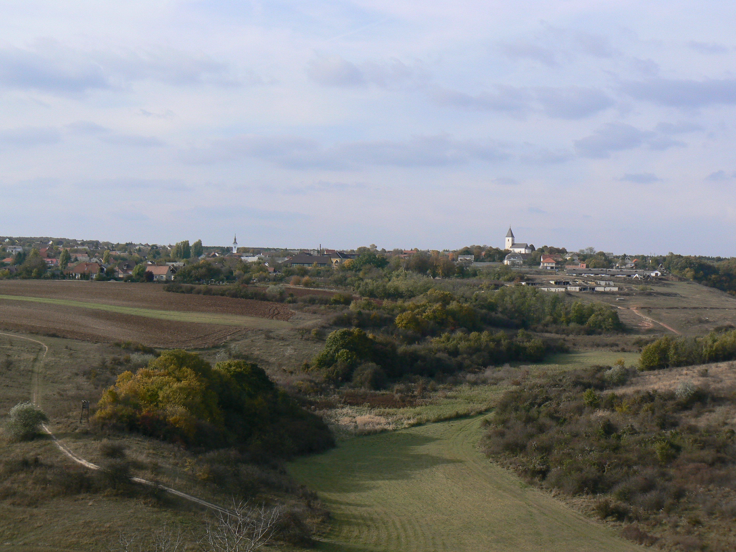 Szentkirályszabadja a távolból (Veszprém megye)